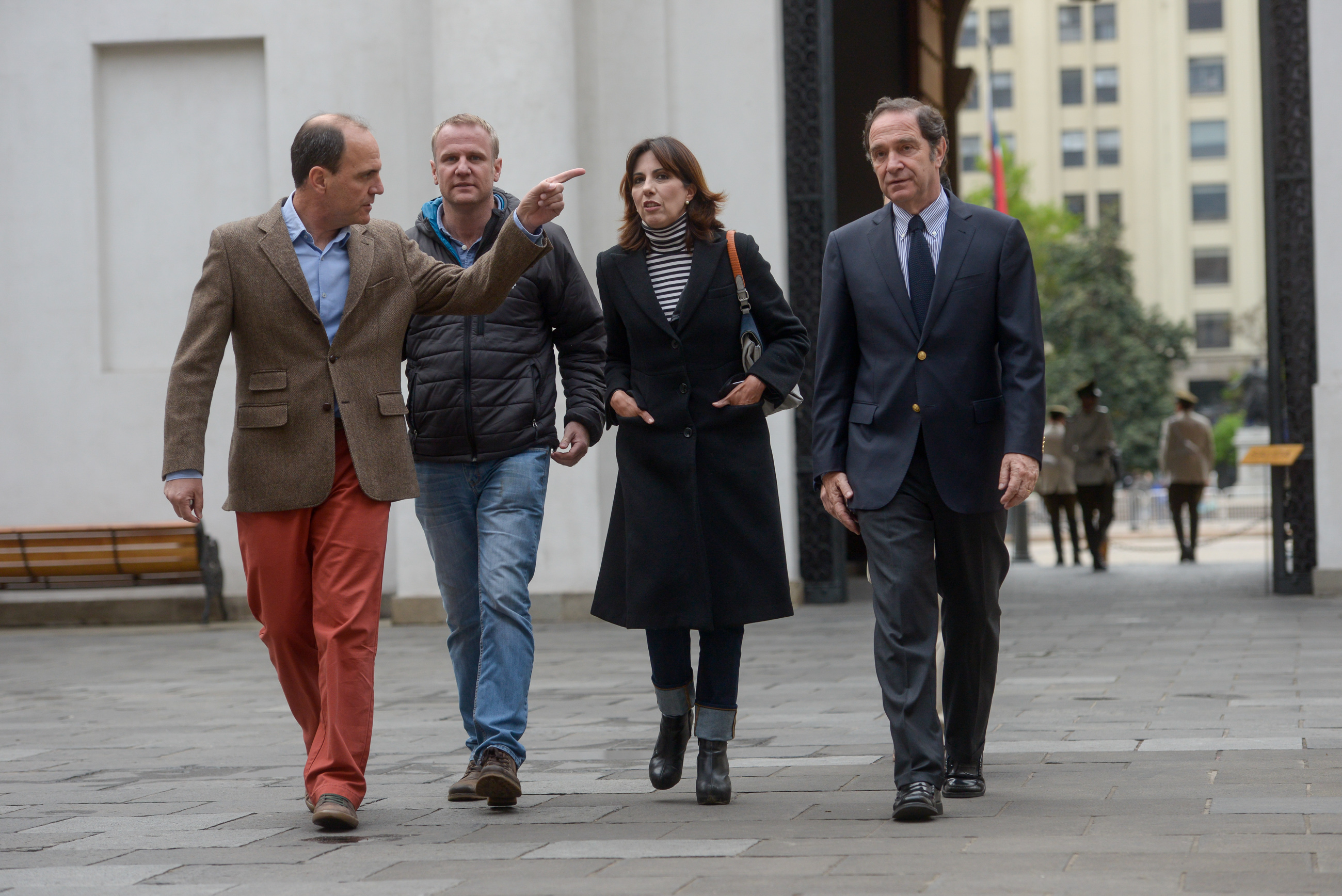 Ministros del Comité Político se reúnen con Servel y Chile Vamos